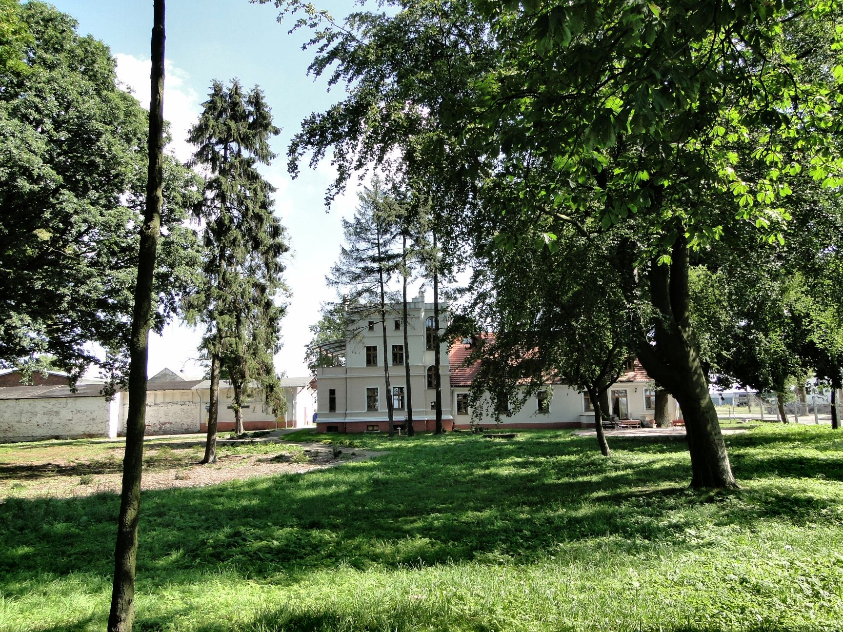 Dwór (XIX w.) w Ostoi 09.1990.